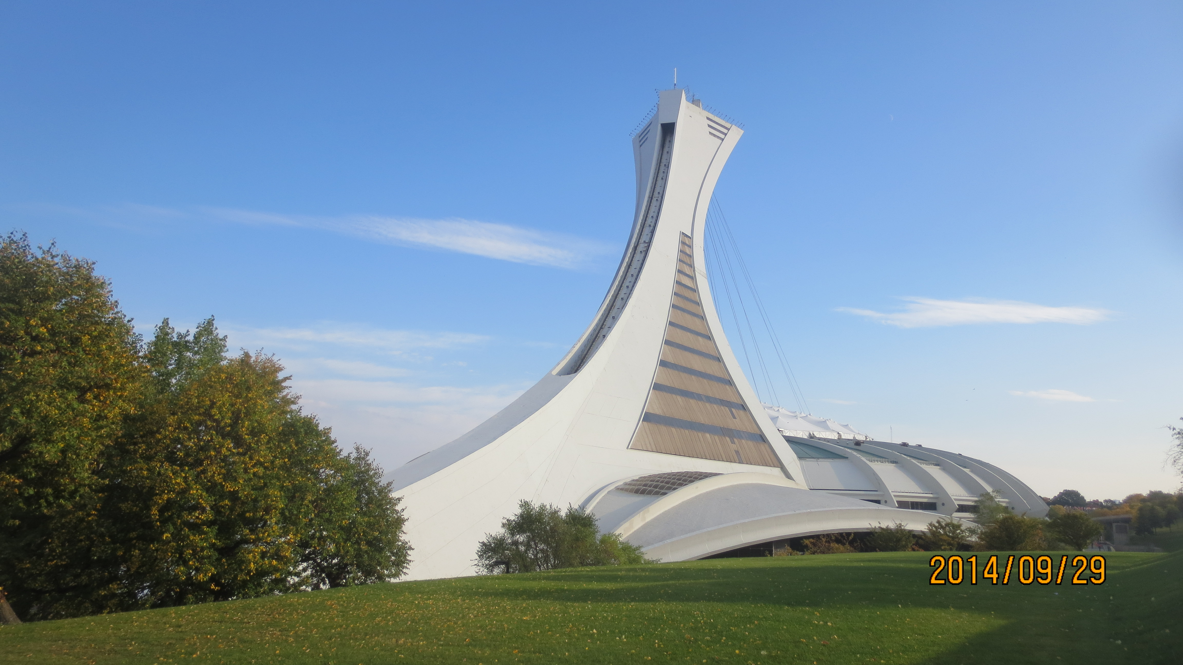 استاديوم المپيك مونترال